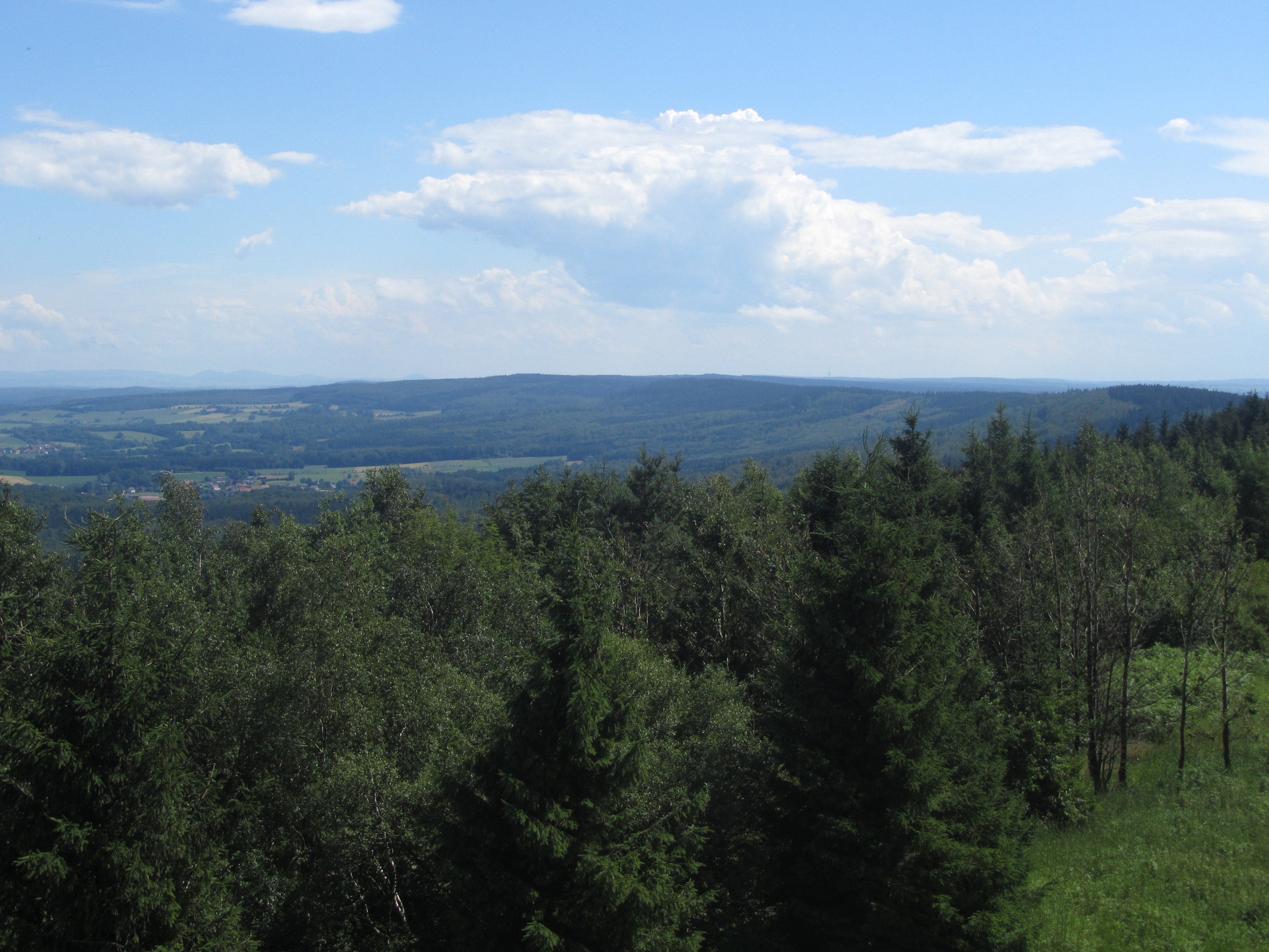 Blick vom Eggeturm auf der Preuß. Velmerstot nach Süden über den Kamm des Eggegebirges. Links im Hintergrund der Habichtswald bei Kassel.